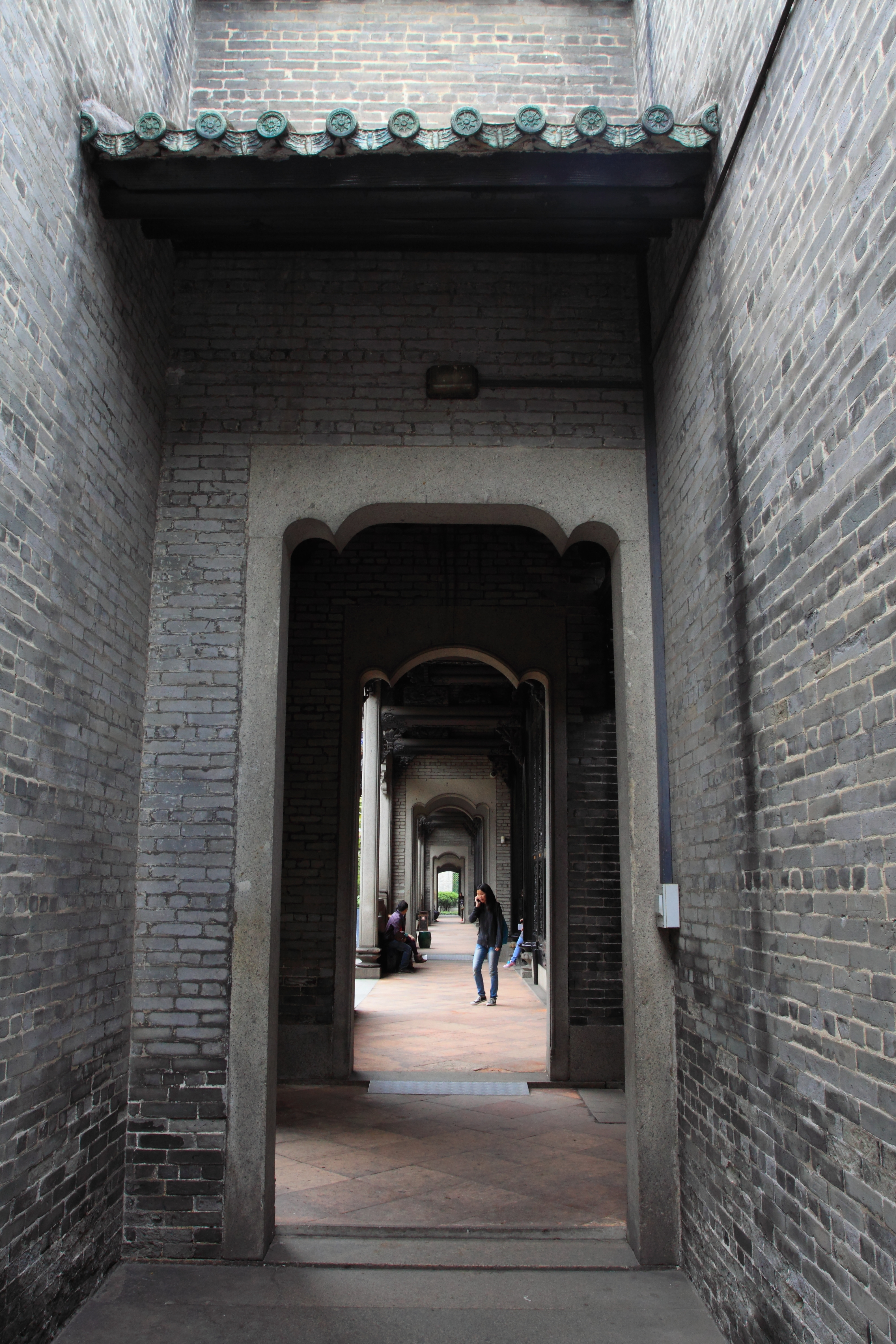 广州陈家祠堂 —— 西部的廊轩